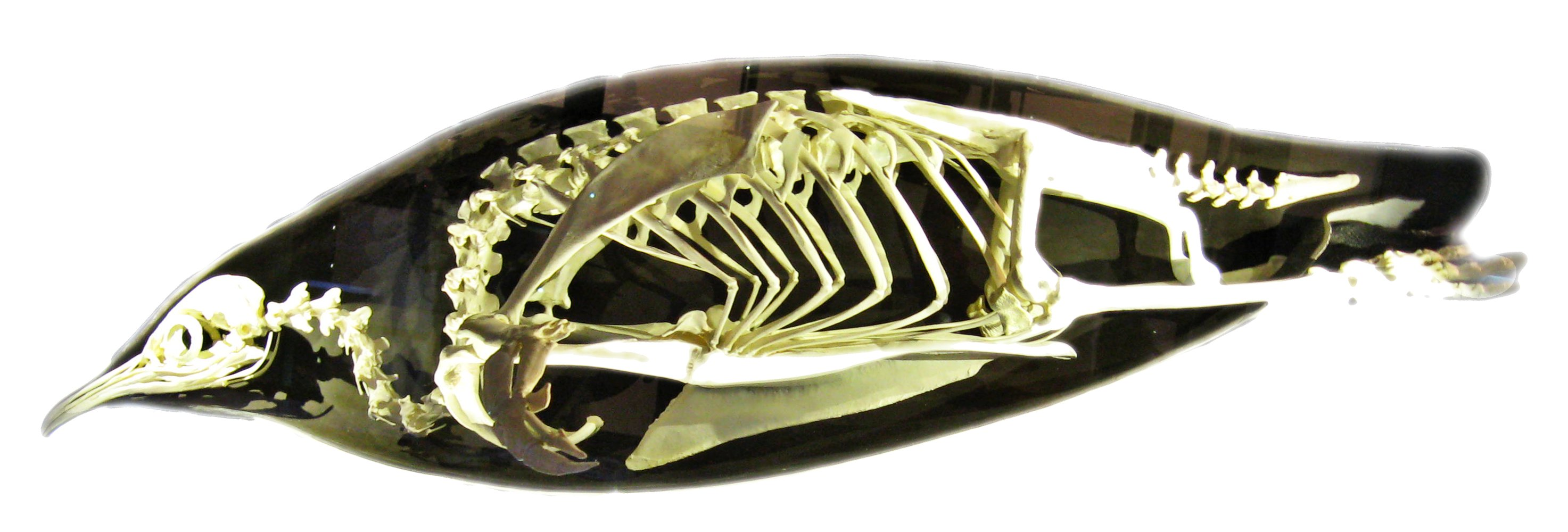 Pinguin im Naturkundemuseum in Berlin